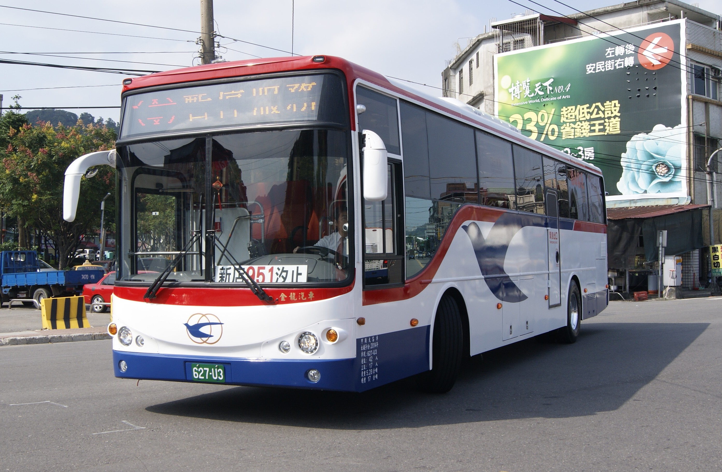 中文（台灣）: 指南客運2014年大客車627-U3。